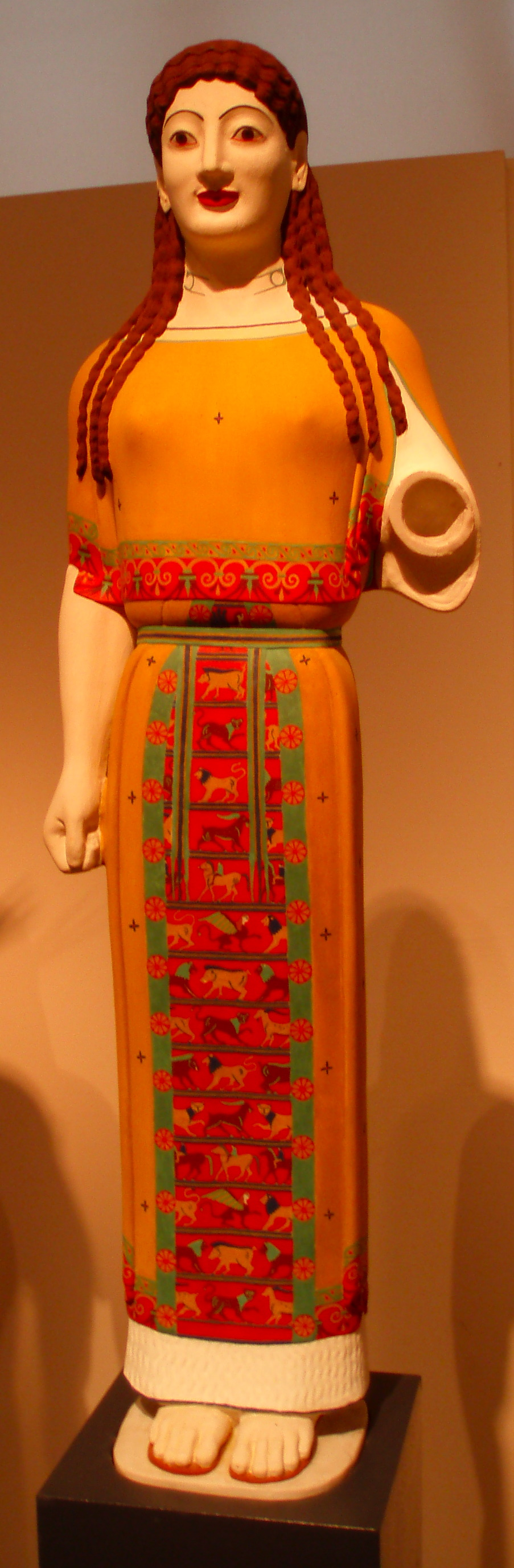 Restitution du décor polychrome de la Korè au péplos, vers 530-520 sous les traits d'Athéna.Etude : Vinzenz Brinkmann. Restauration des cassures : Alfons Neubauer, Christoph Bergmann. Dorure : Sylvia Kellner. Peinture : Ulrike Koch-Brinkmann. Original : Acropole d'Athènes (Inv. n°679). Copie peinte : Staatliche Antikensammlungen und Glyptothek. Exposition « Bunte Götter » dans la version montrée à Athènes.